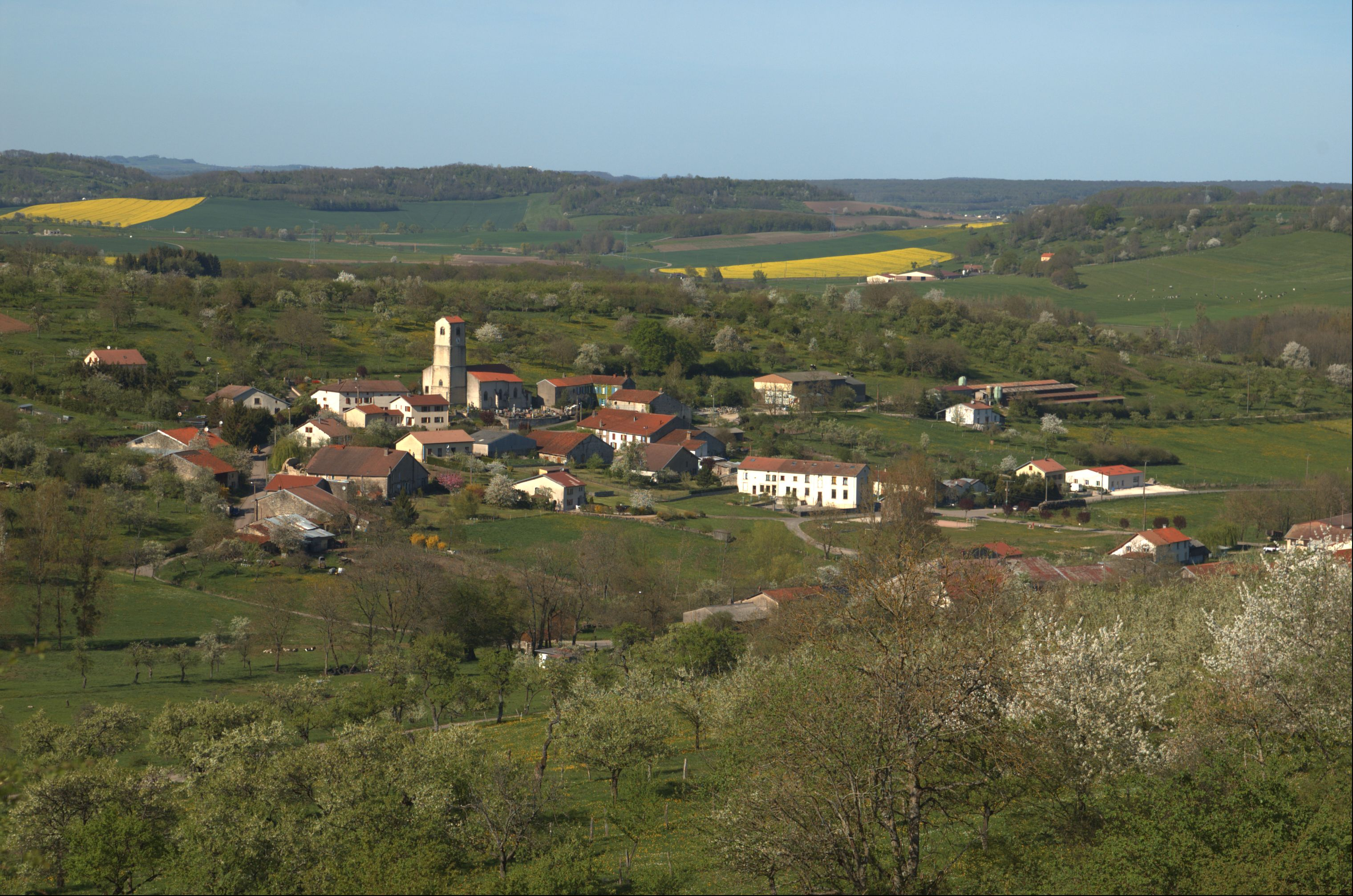 Gugney-aux-Aulx - Vue depuis la colline du Mété centrée sur le versant nord